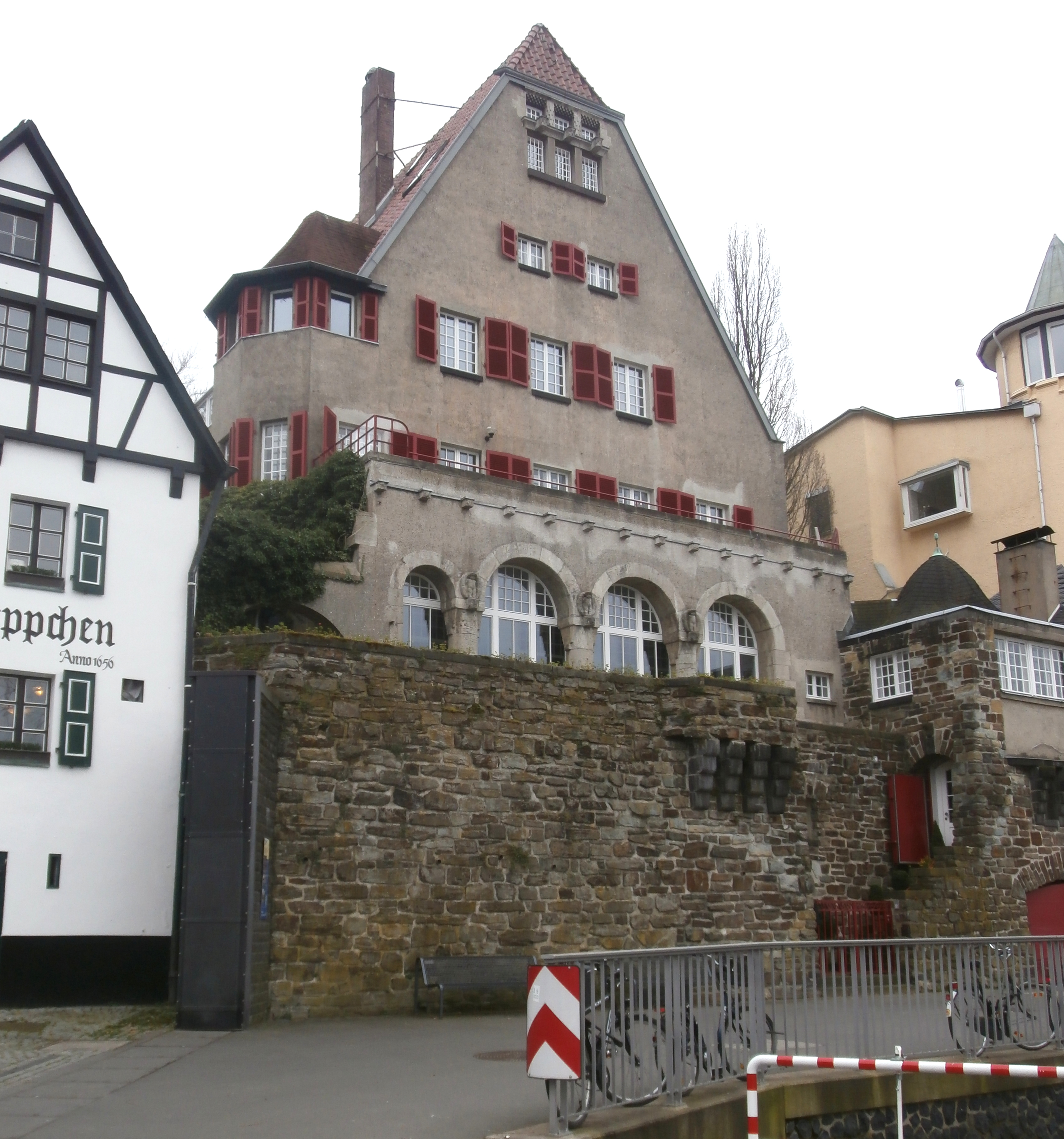 Denkmalgeschützte Villa, Kirchstraße 13, Köln-Rodenkirchen: Ansicht vom Rodenkirchener Leinpfad